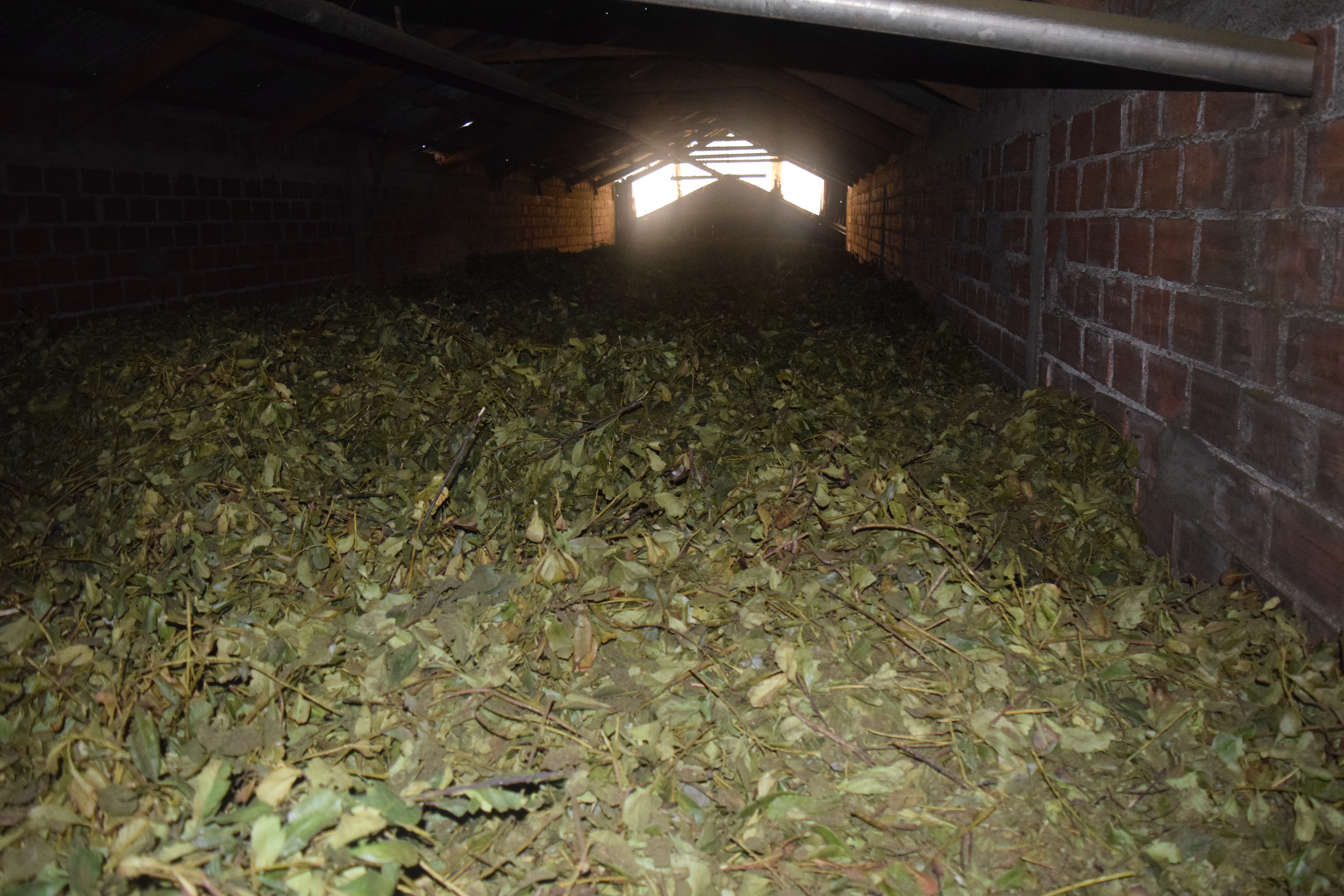 Secado de la Yerba Mate previo al canchado,en un secadero de la localidad de Campo Ramón, provincia de Misiones.